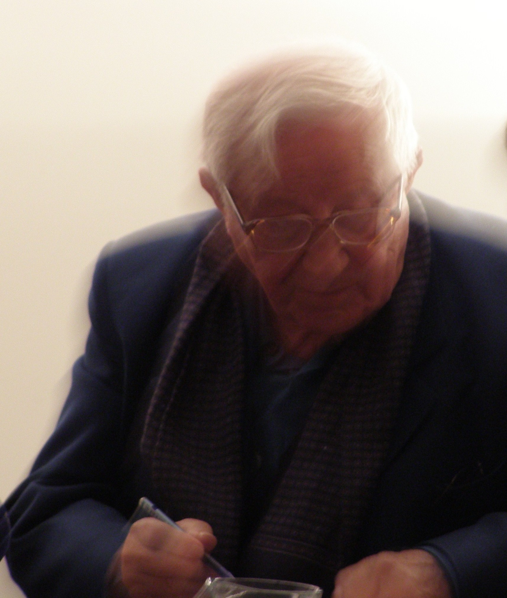 T. Rózewicz